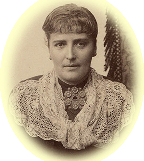 Amalie Skram, Norwegian author and playwright